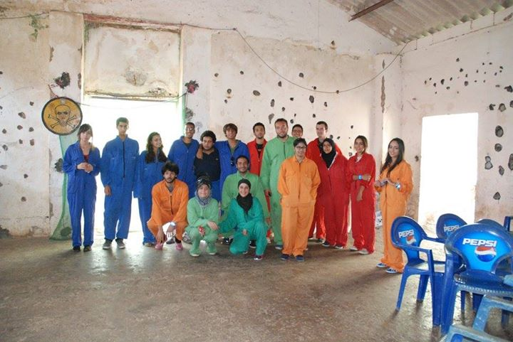 Journée d'intégration à Playland - Rabat